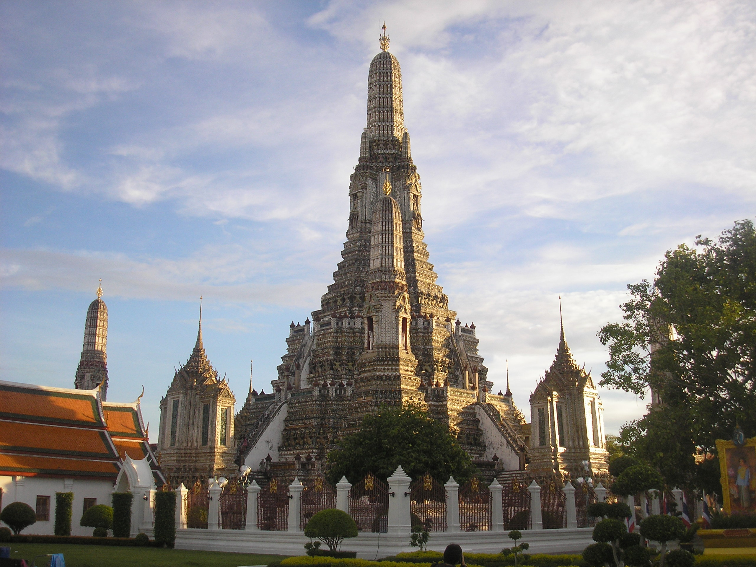 Wat Arun in Bangkok